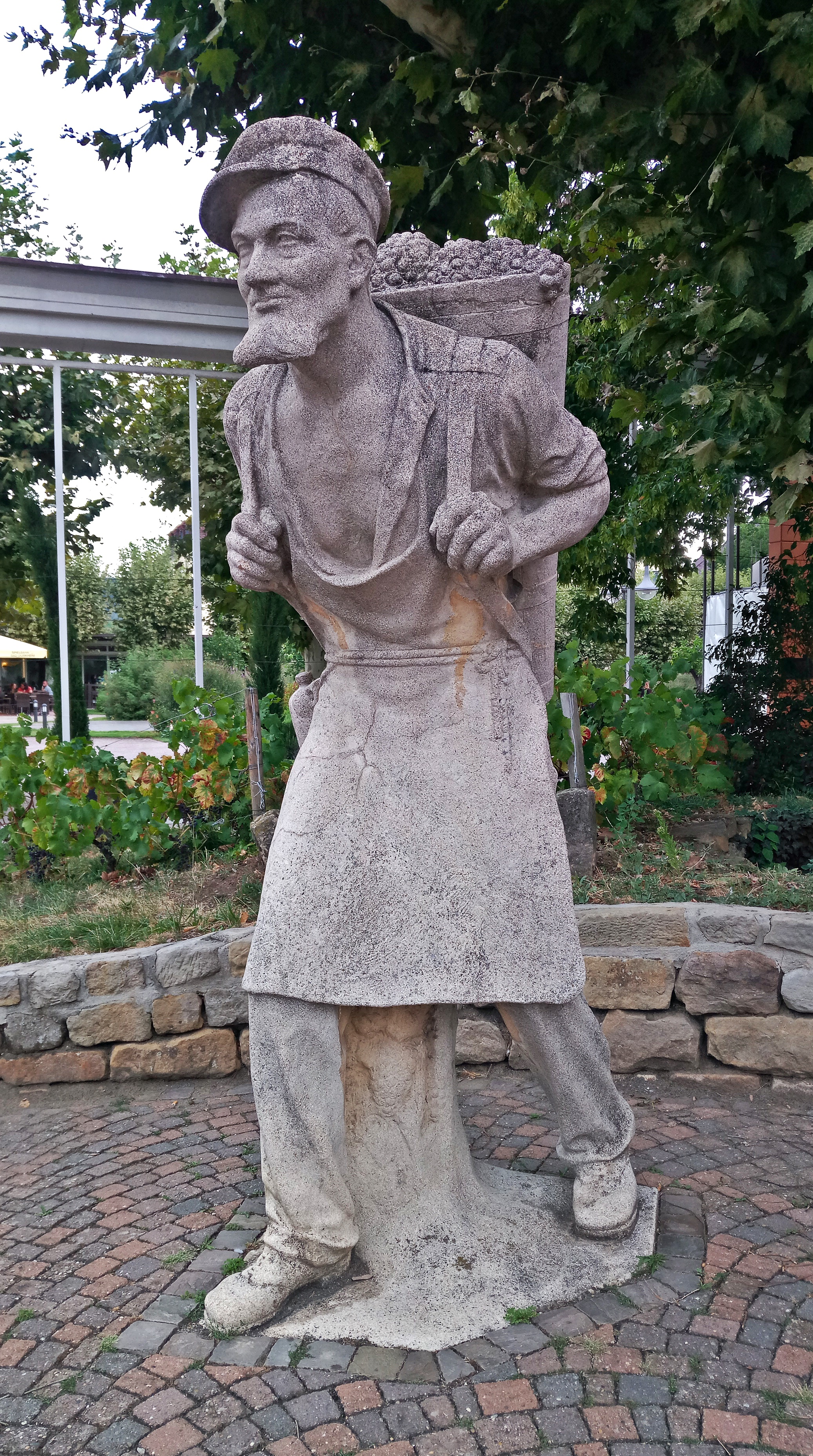 Bad Dürkheim, neben Kurhaus, Winzerfigur von Gustav Adolf Bernd